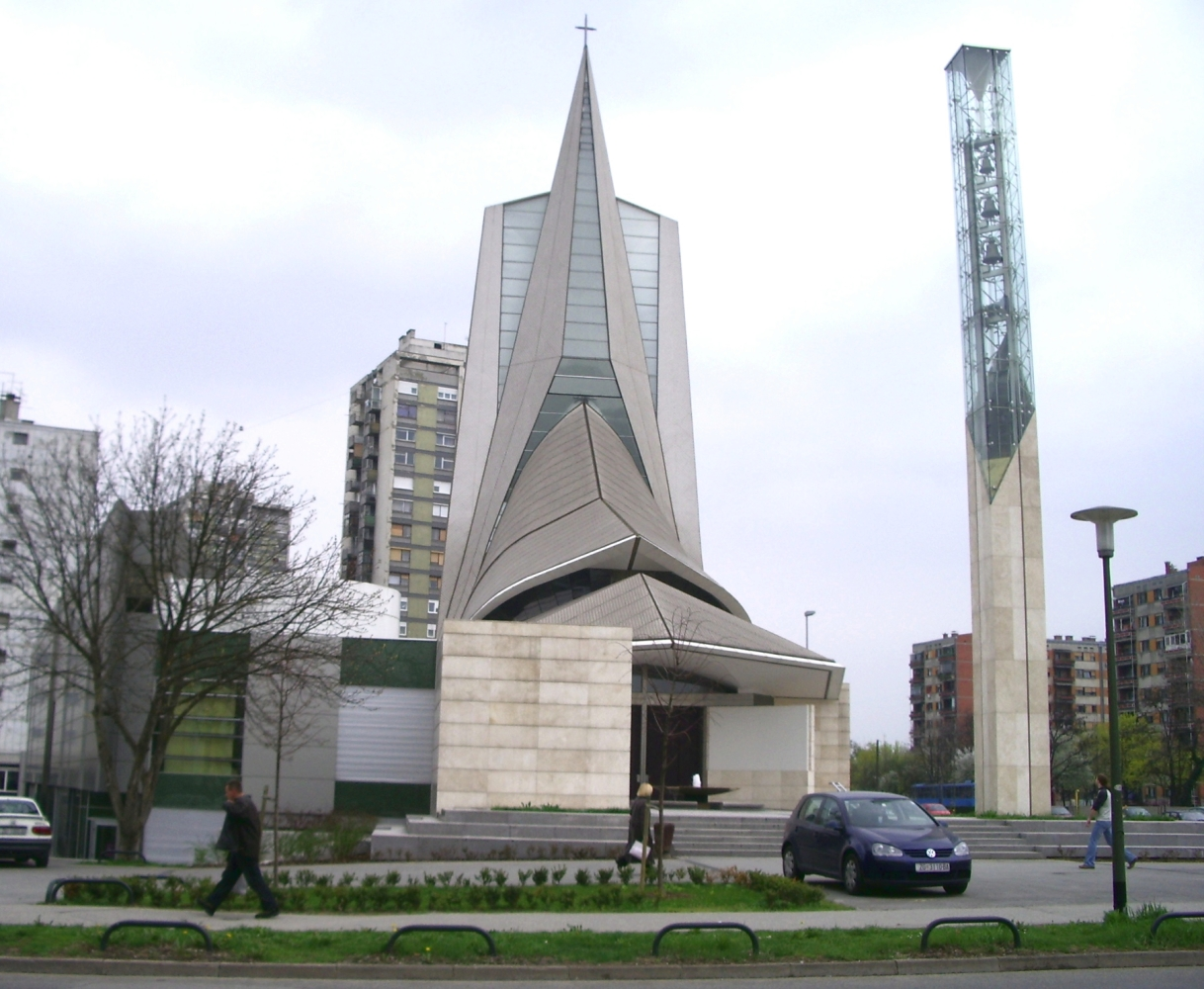 Crkva Blaženog Augustina Kažotića na Pešćenici u Zagrebu